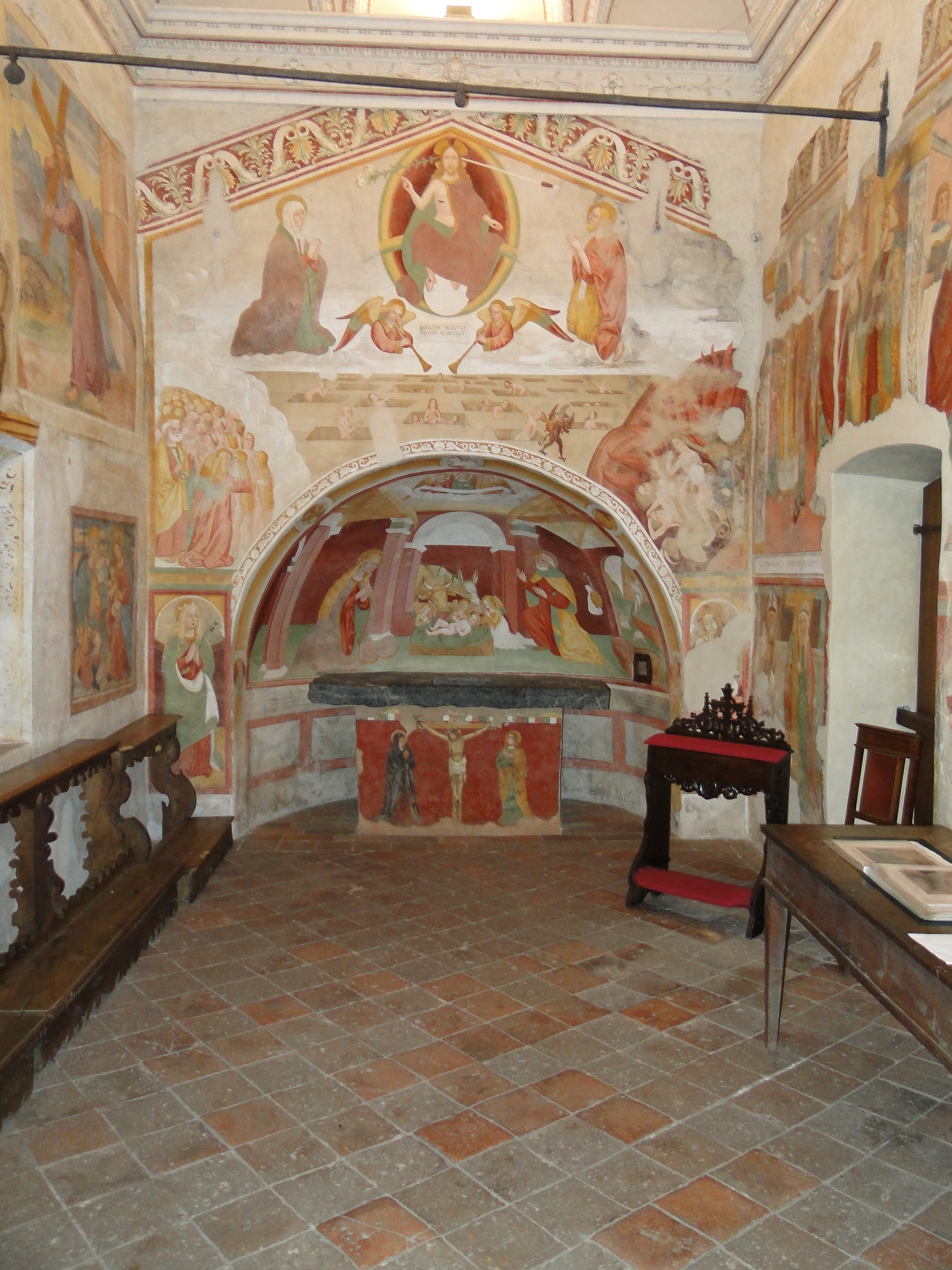 Santuario di san Patrizio. Colzate (BG). Interno del sacello